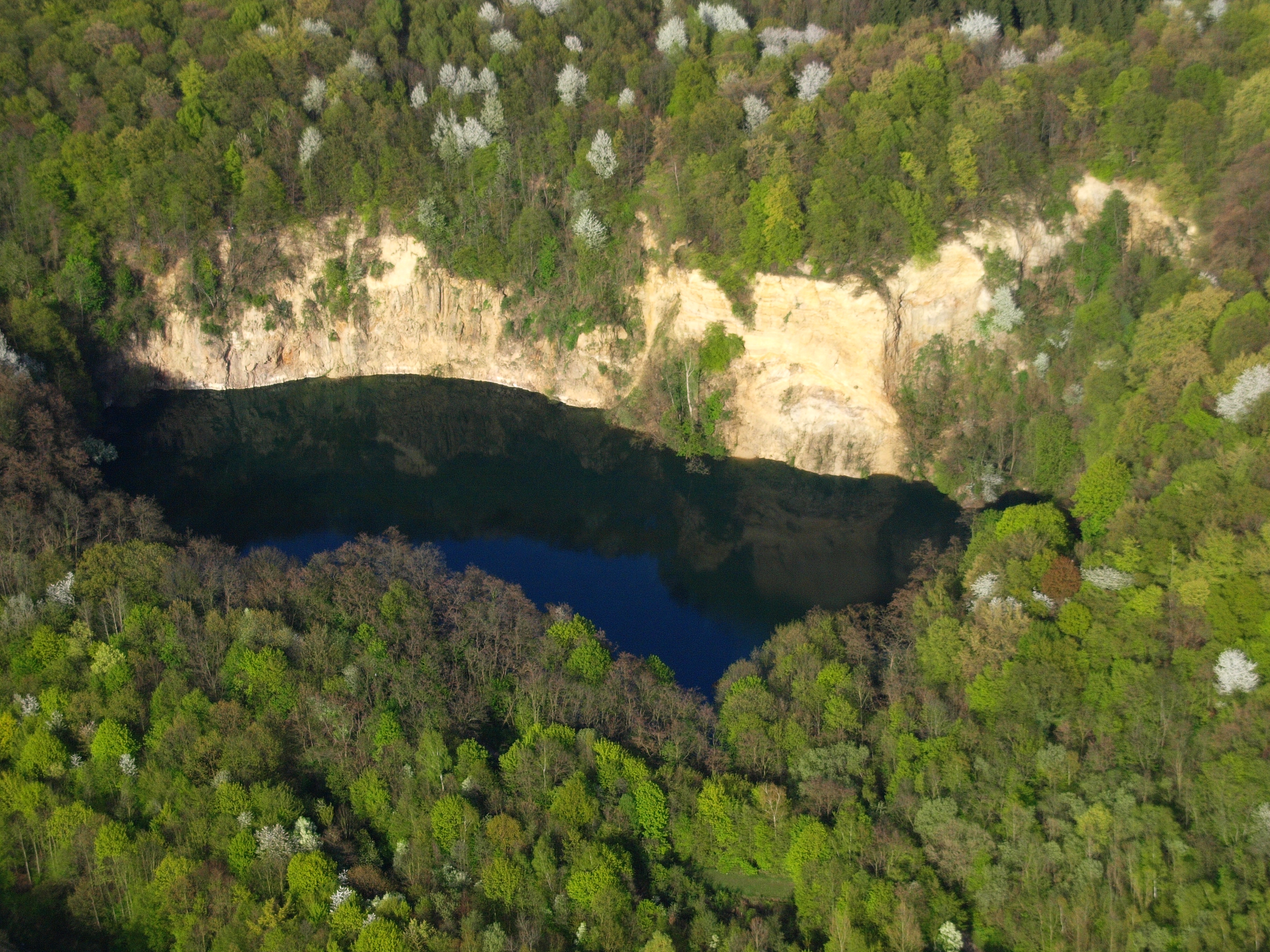 Dornheckensee am westlichen Fuß des Röckesbergs, Ennert, Bonn: Luftaufnahme